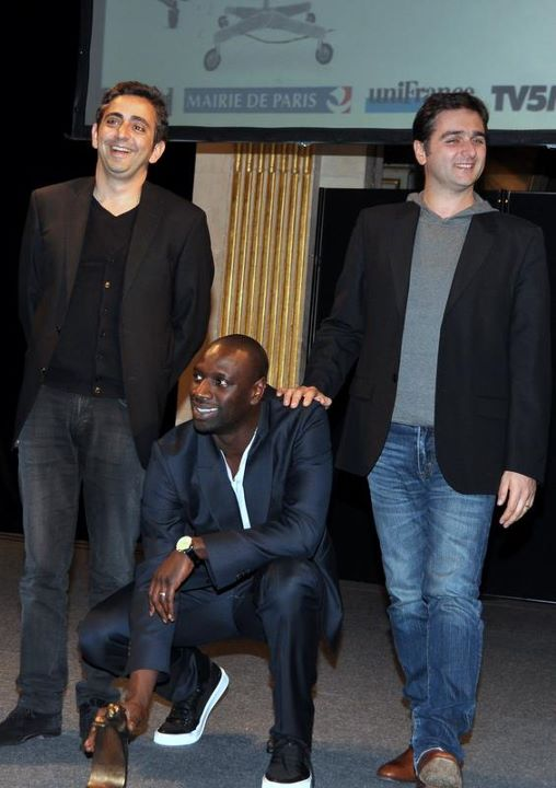 Eric Toledano, Omar Sy et Olivier Nakache à la cérémonie des Prix Lumières